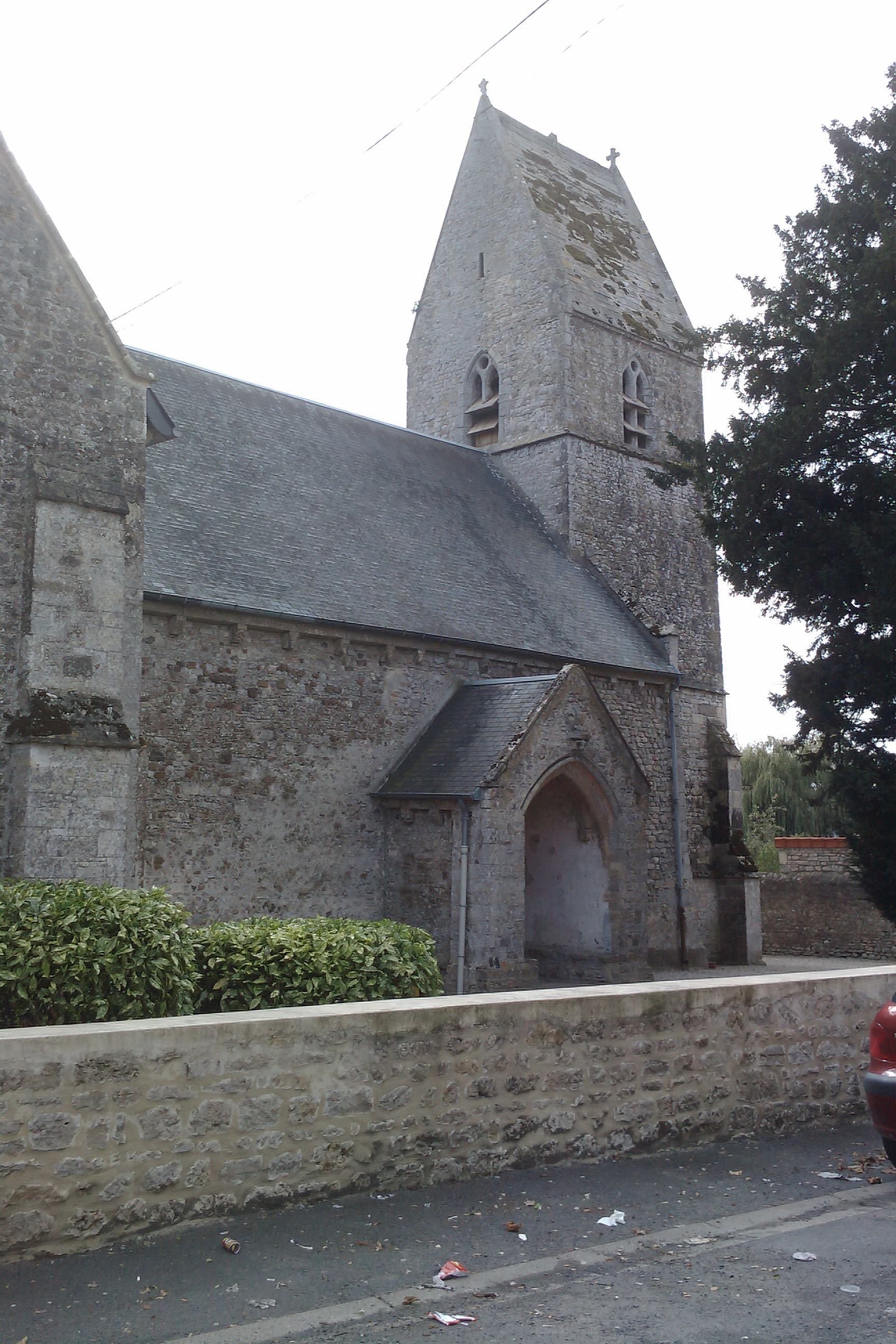 église de Saint-Hilaire-Petitville